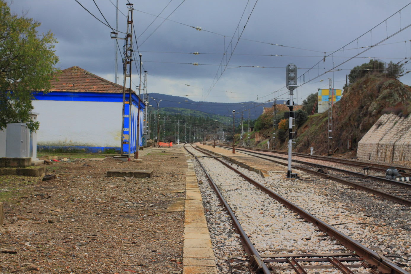 Vista del edificio de la estación, postes de señales y vias. Venta de Cardenas.